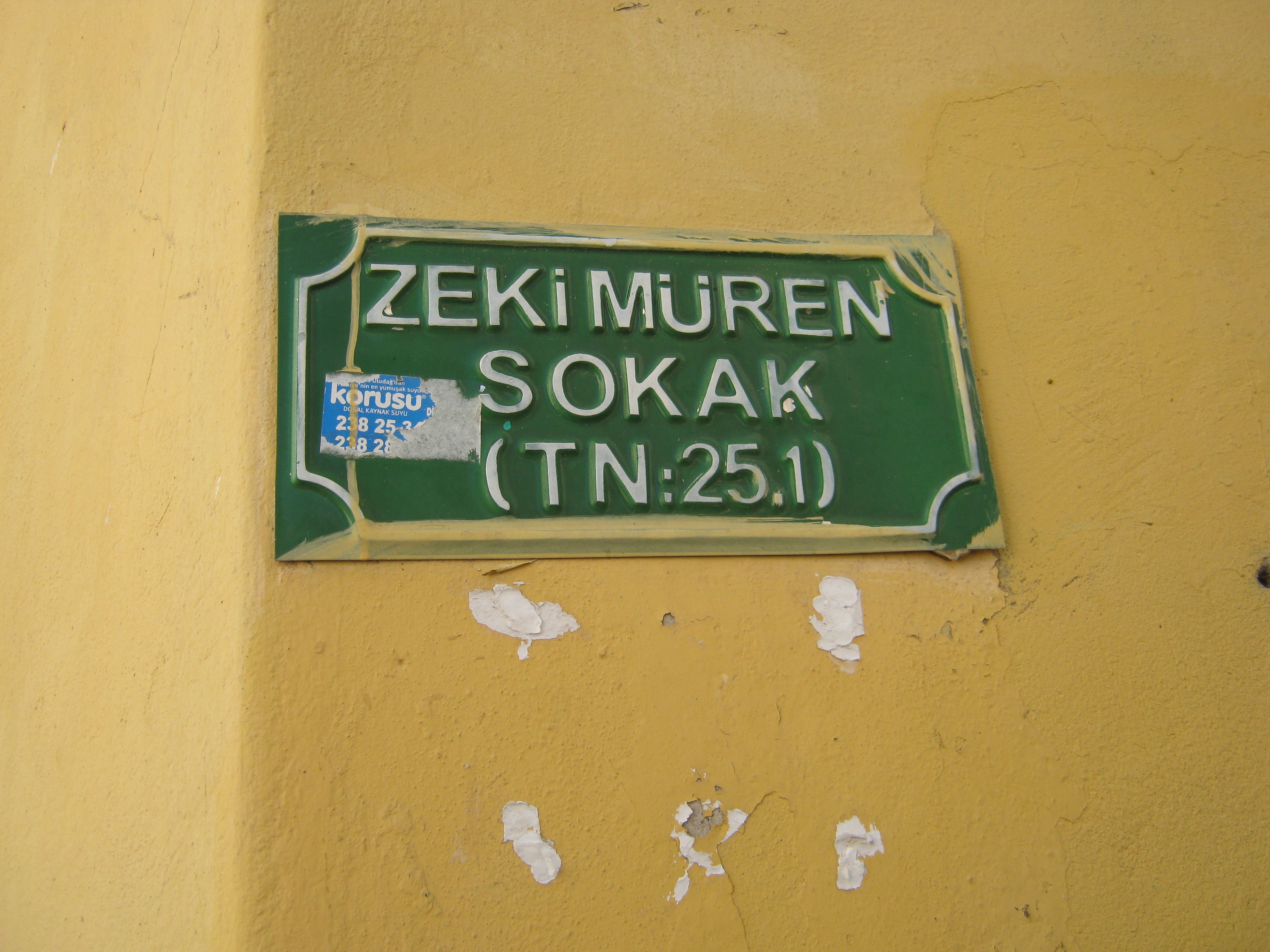 müzeyyen senar sokağı tarihi evleri bursa